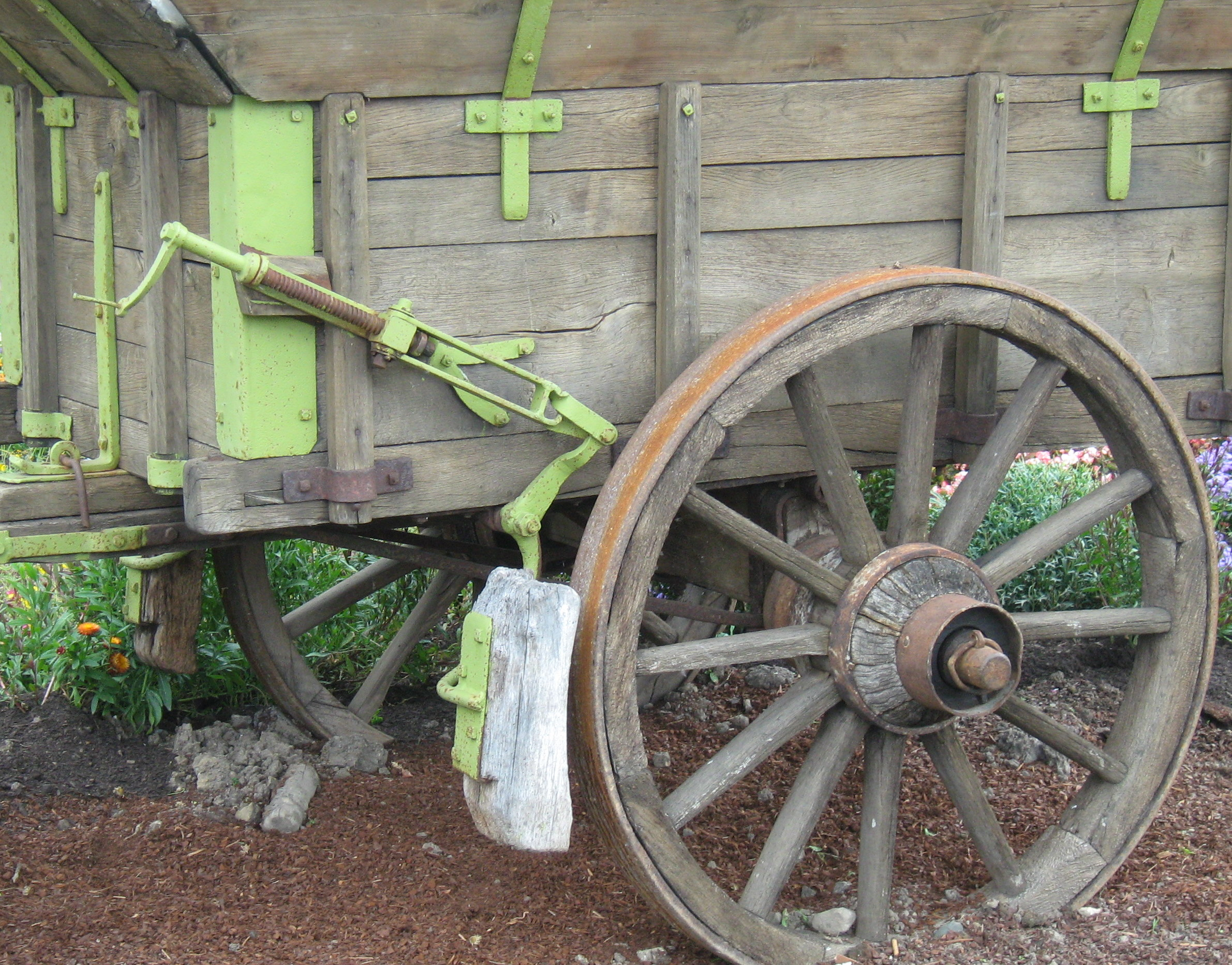 alte Holz-Bremse